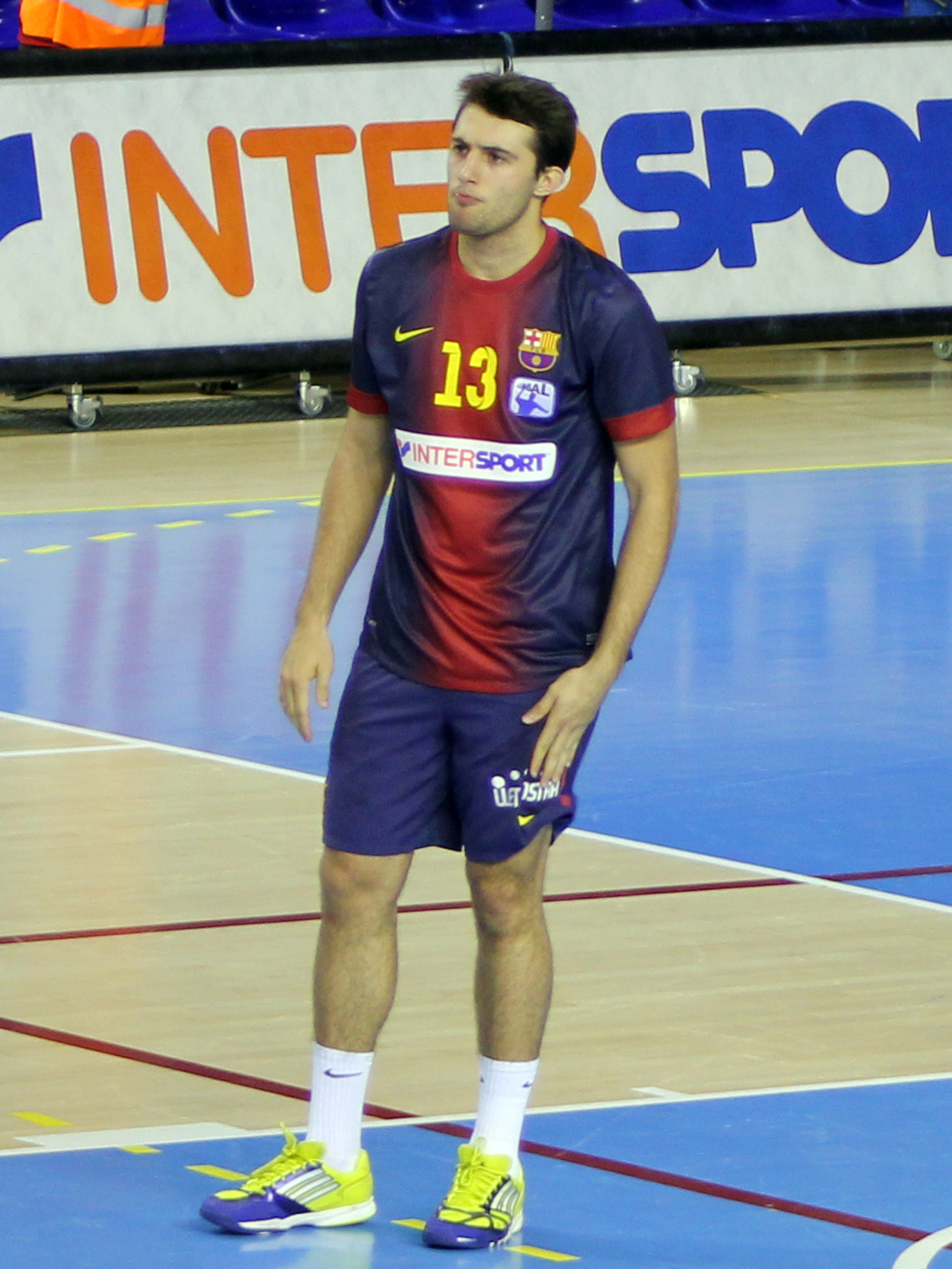 Foto realizada por Javier Segura (@castroquini)